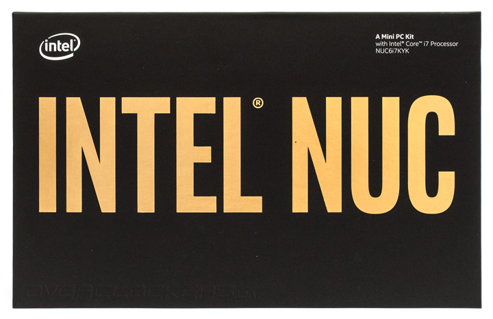 INTEL NUC